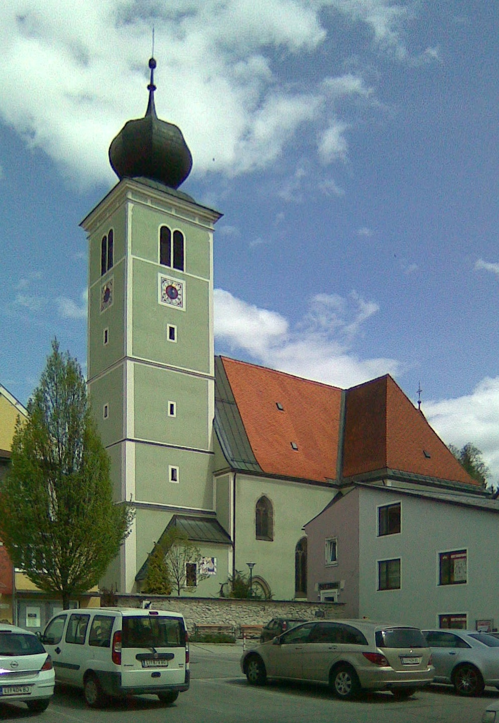 Kirche Liezen